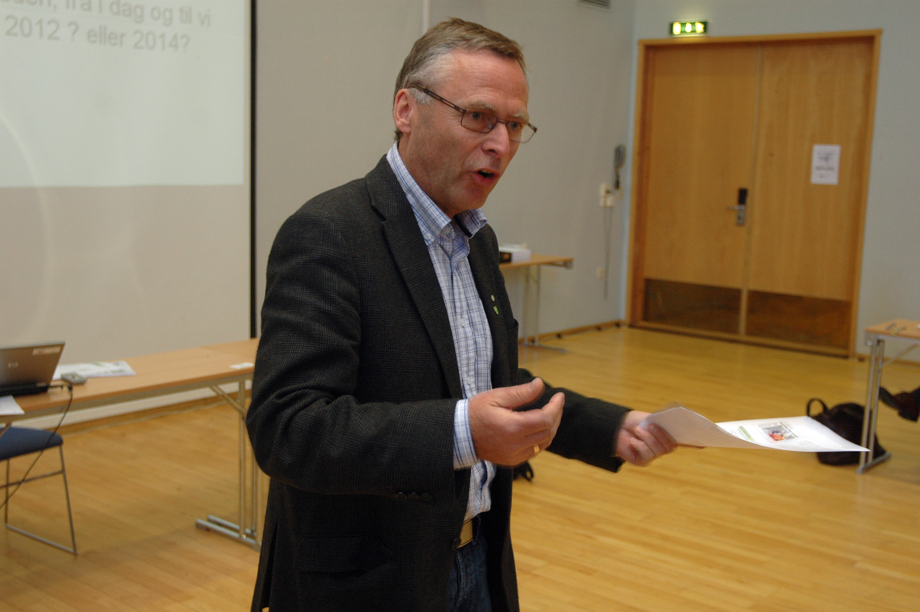 Ordfører i Frosta kommune, Frode Revhaug (H).